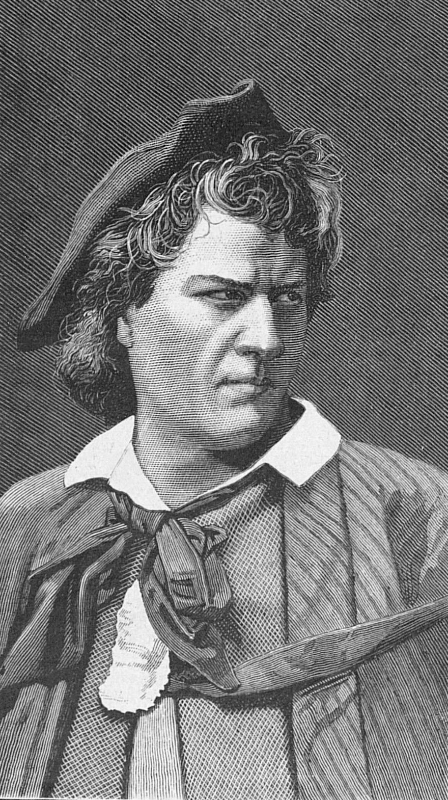 Людвиг Барнай в роли Нарцисса